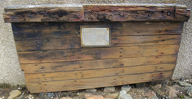 Rosebud hull